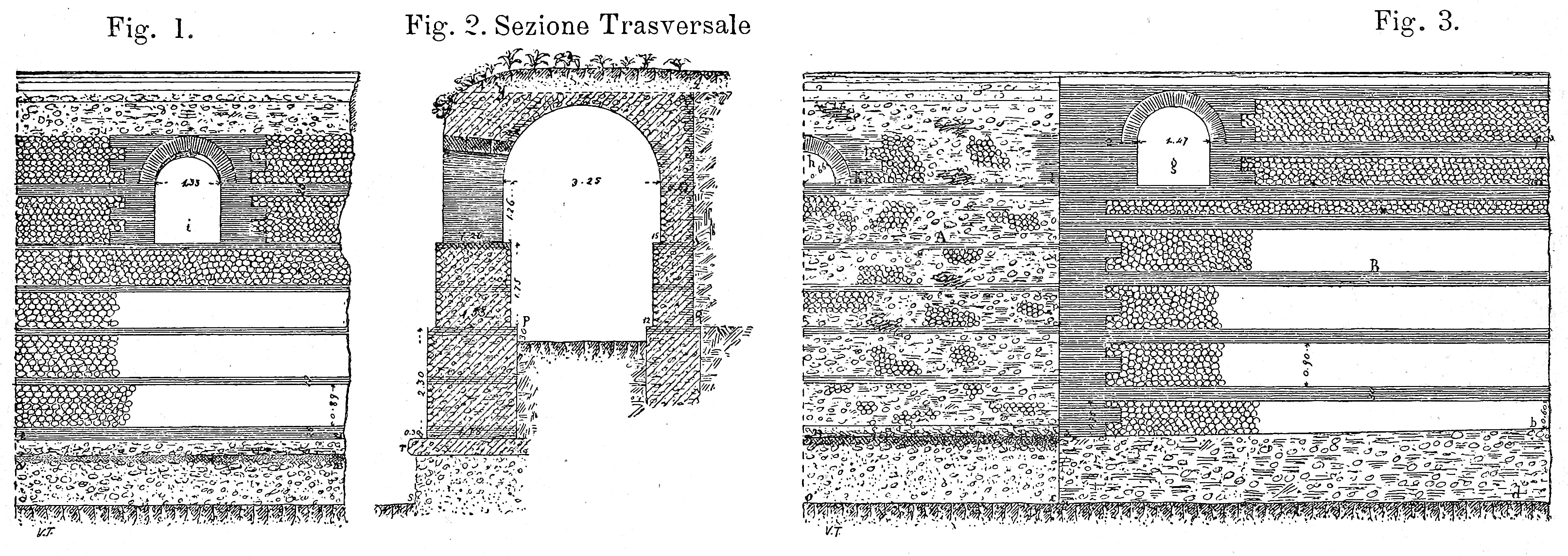 Illustrazioni da I monumenti e le opere d'arte della città di Benevento: lavoro storico, artistico, critico, di Almerico Meomartini, Tipografia di L. de Martini e figlio, Benevento, 1889